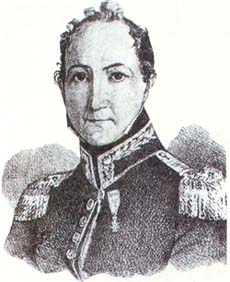 Retrato grabado del General Lino de Clemente